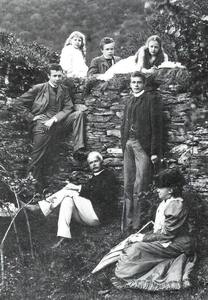 Foto van het prinsengezin Von Wied, omstreeks 1890. Eventueel berustend auteursrecht verlopen. Afbeelding komt in meerdere publicaties voor. Deze versie gevonden op alwaar het zonder auteursrechten gekopieerd mag worden.